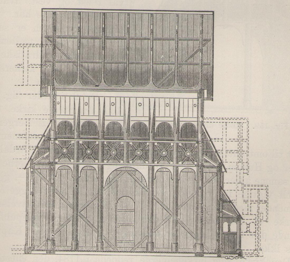 Lengdesnitt av Stedje stavkyrkje, etter G. Bull. Frå L. Dietrichson: De norske stavkirker (Kristiania og Kjøbenhavn, 1892), p. 289